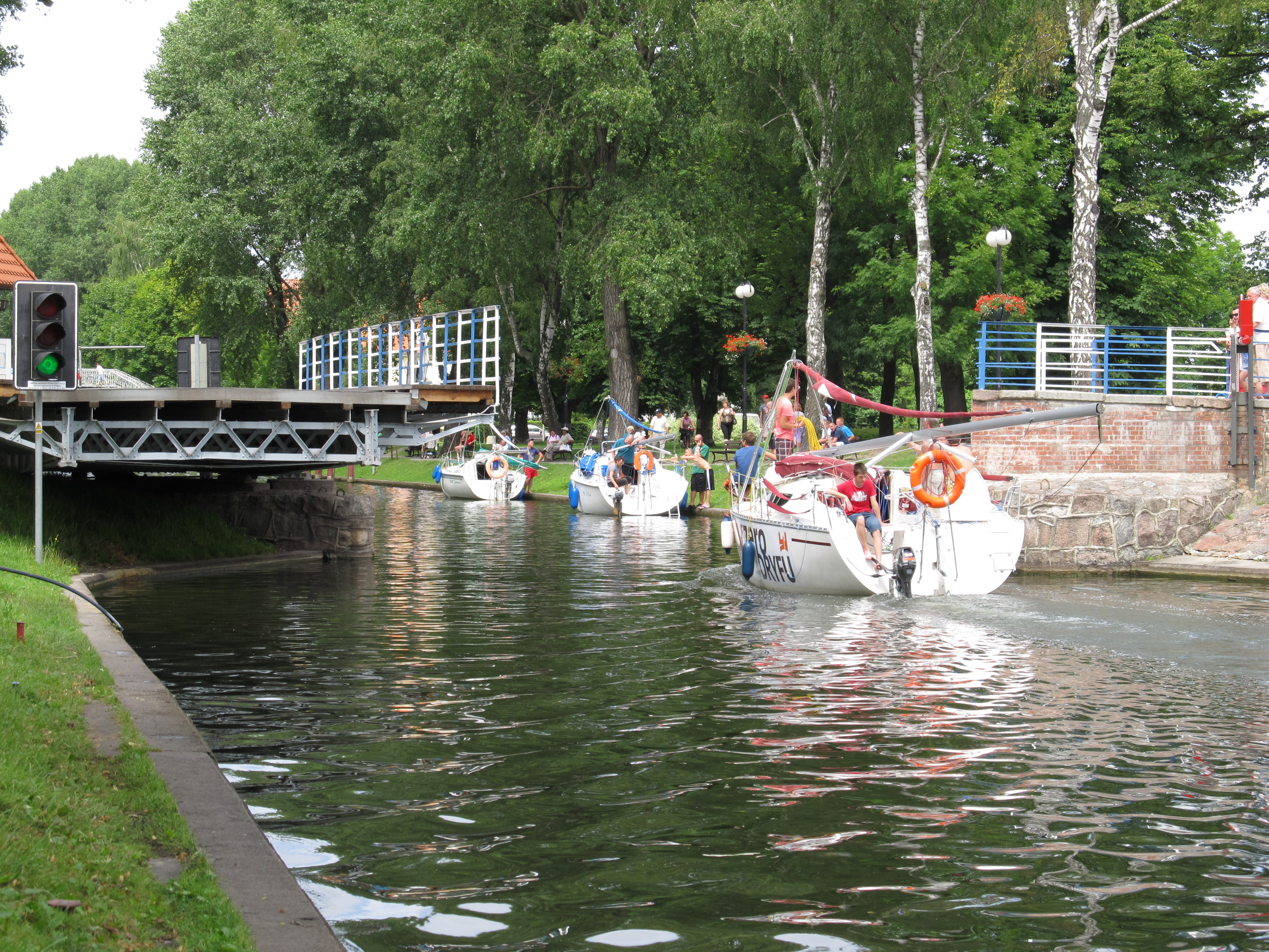 Giżycko - most obrotowy z urządzeniami na Kanale Łuczańskim (zabytek nr A-701)